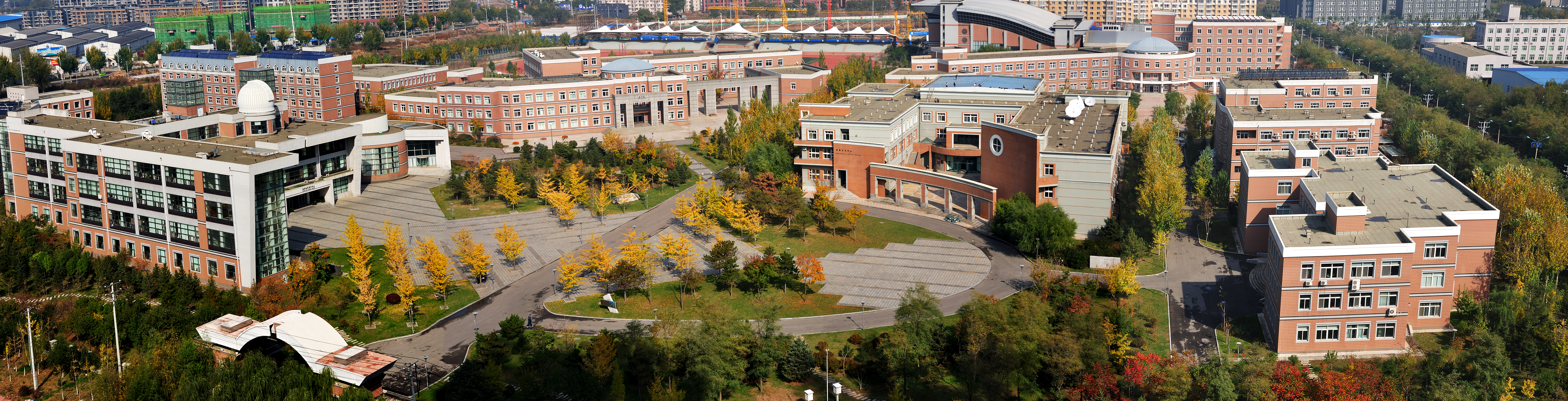 hunnan-1